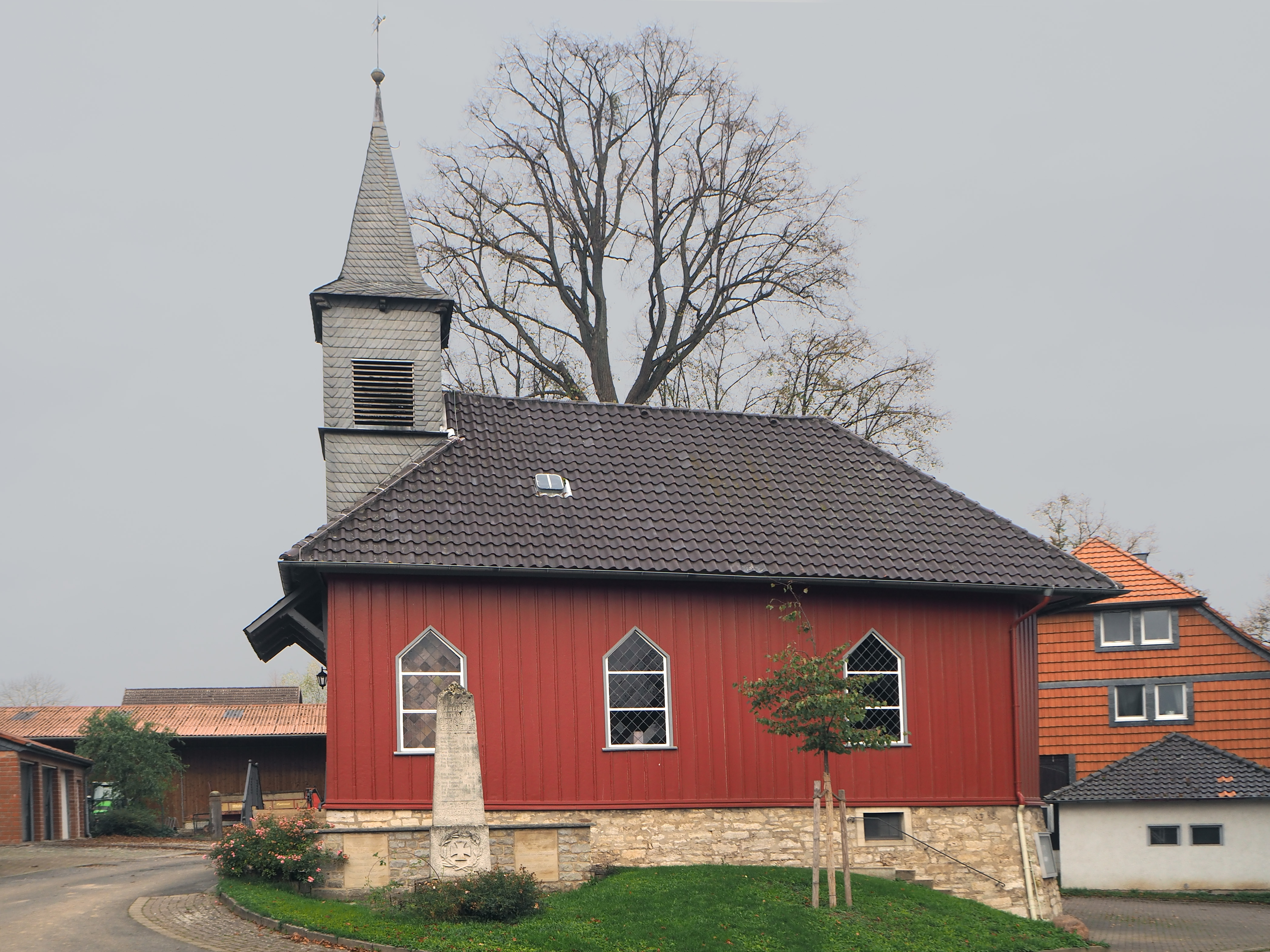 Wrescherode (Bad Gandersheim) – Dorfkirche St. Urban – Foto 2019 - Die Kapelle in Wrescherode ist dem heiligen Urban und der Jungfrau Maria geweiht. 1498 wurde der Kapelle ein Messbuch geschenkt. Das genaue Baujahr ist aber unbekannt. Der rote Anstrich wurde von den Kirchenmitgliedern selbst bestimmt.